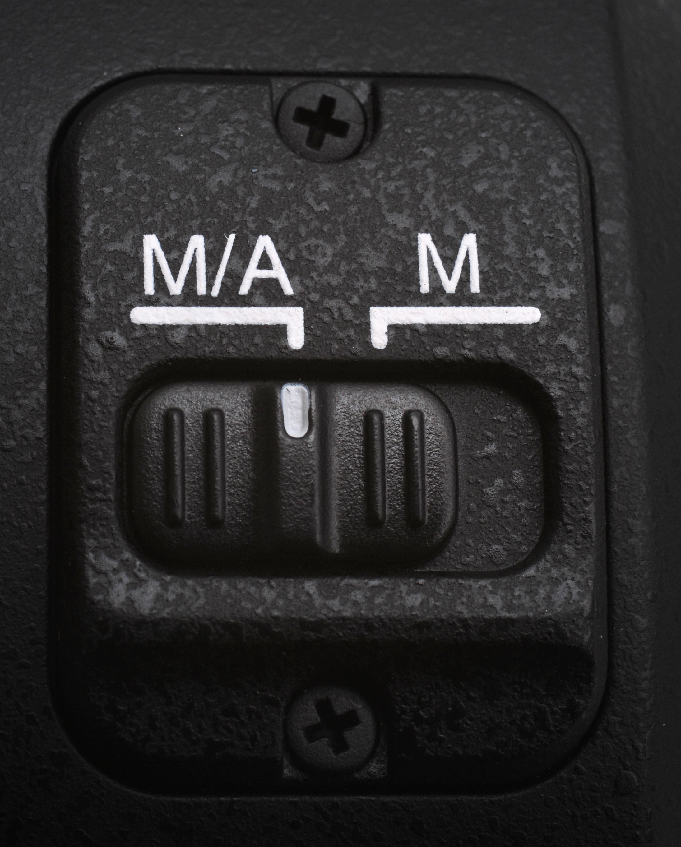 Nikkor 1,4/85)